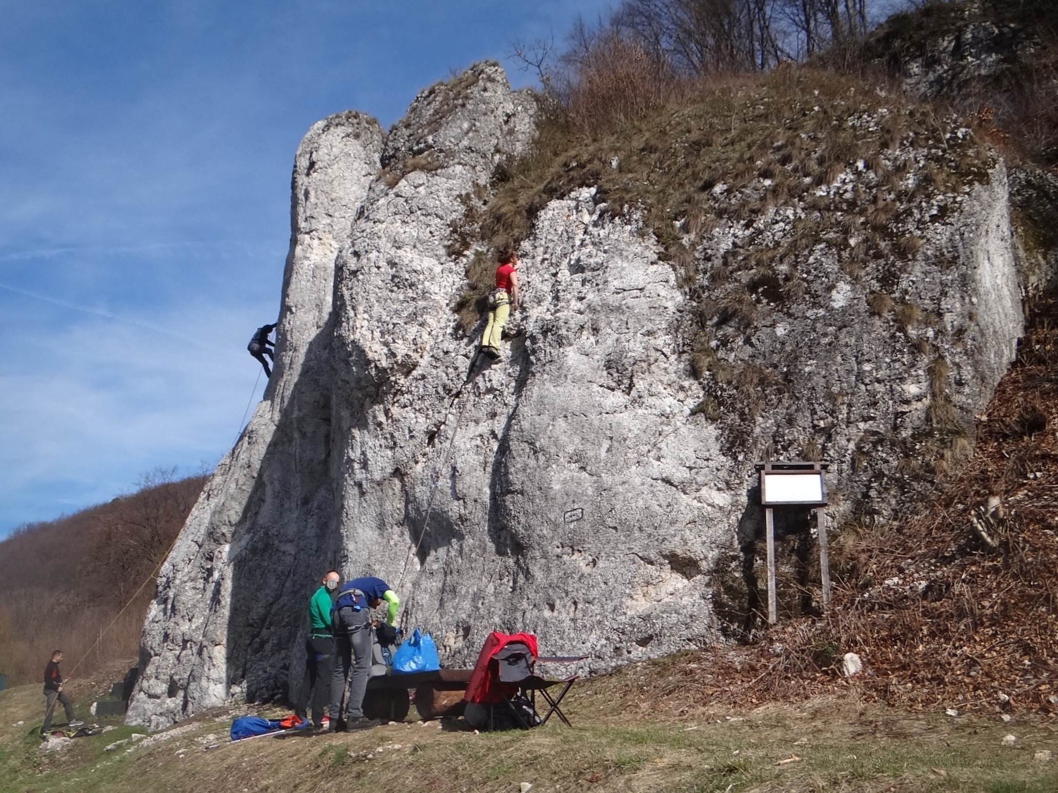 Skały Jupiter i Murawa w grupie skał nad Boiskiem w Dubiu